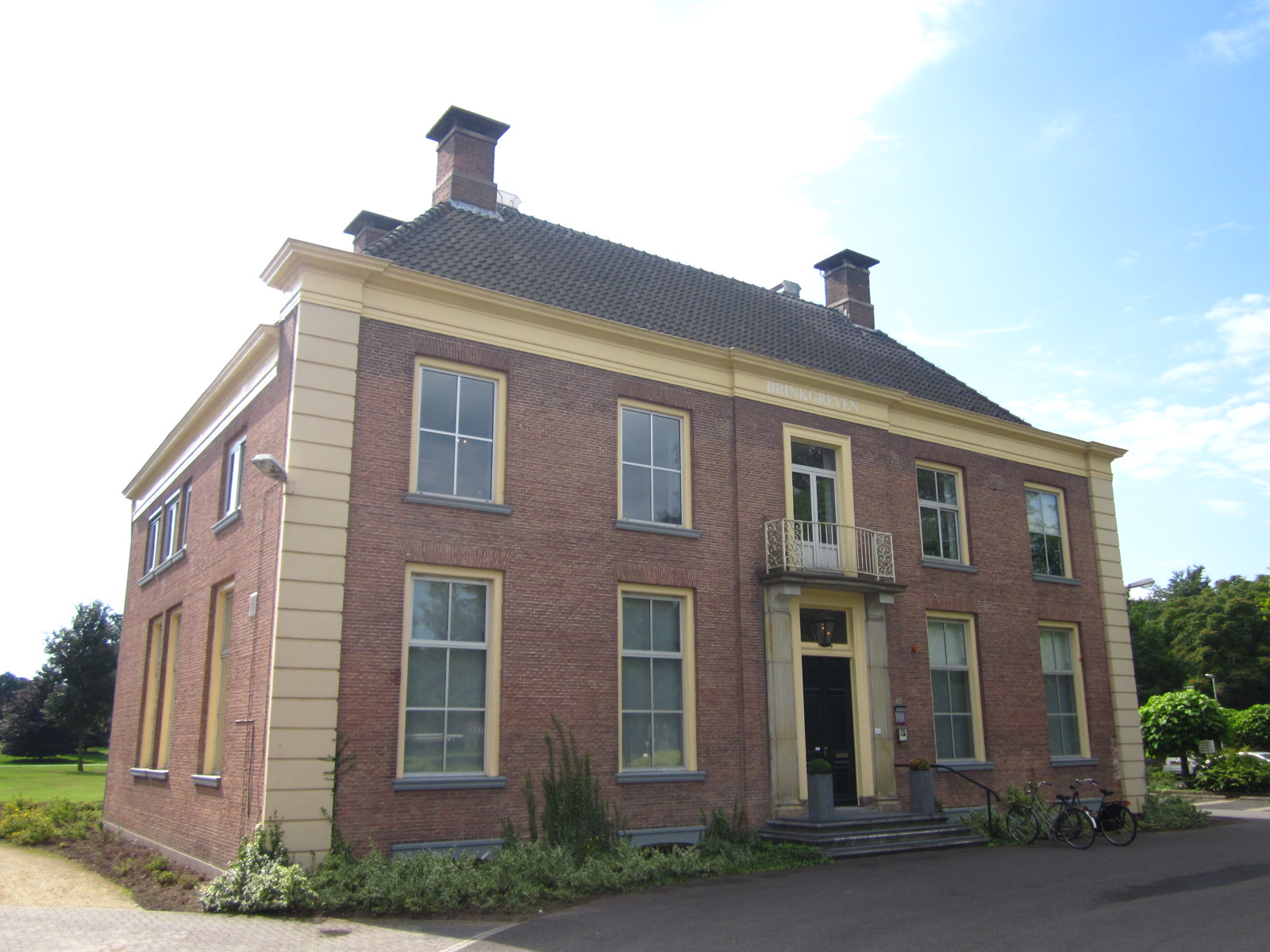 Woning landgoedeigenaar, later administratie- en directie gebouw psychiatrisch ziekenhuis Brinkgreven te Deventer. In 2013 zetel van de raad van bestuur van Dimence, instelling voor geestelijke gezondheidszorg in Overijssel. Gemeentelijk monument